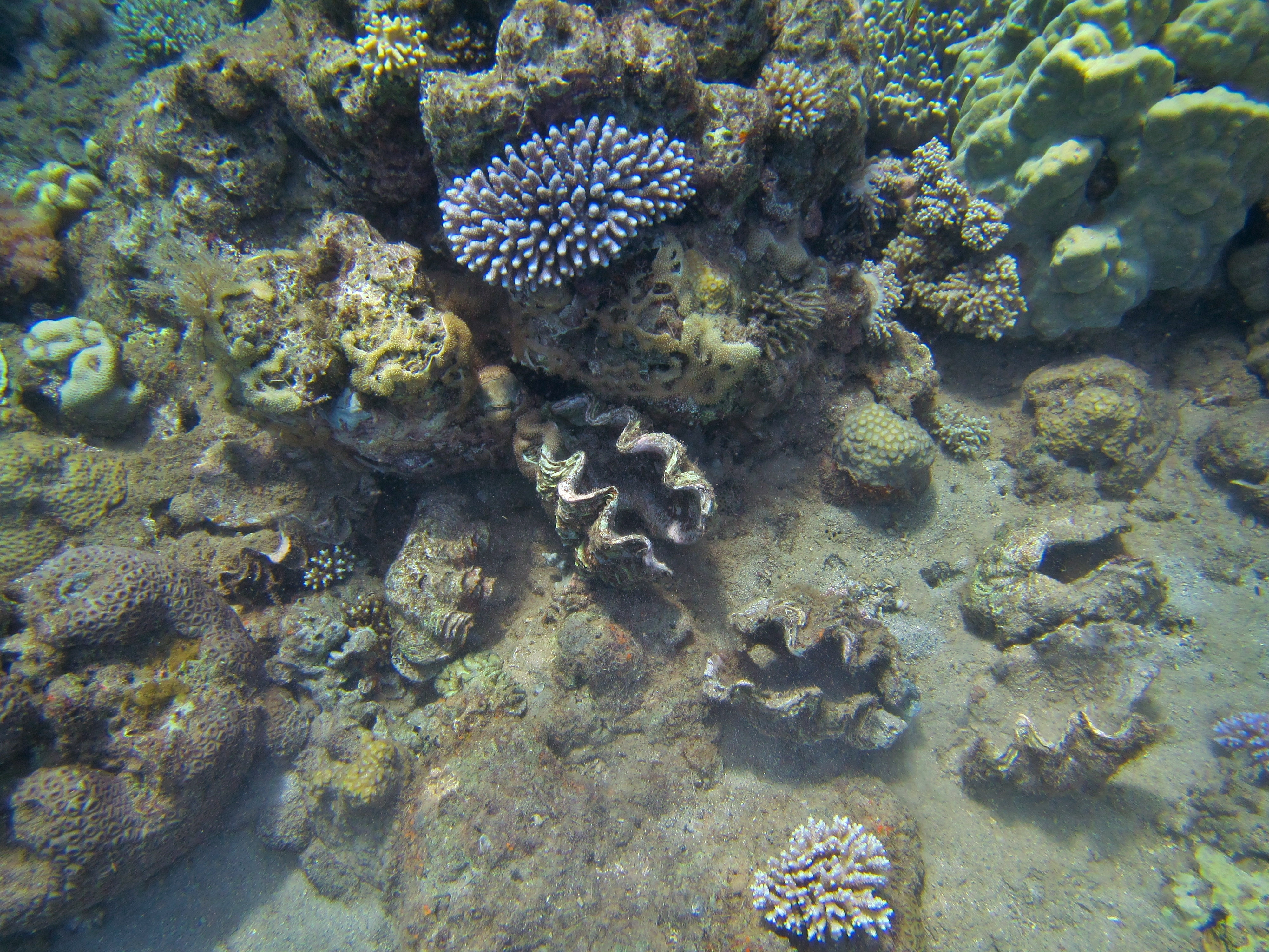 Restes d'une séance de braconnage à Petite-Terre, à Mayotte. On distingue une accumulation de coquilles de bénitiers, espèce protégée.